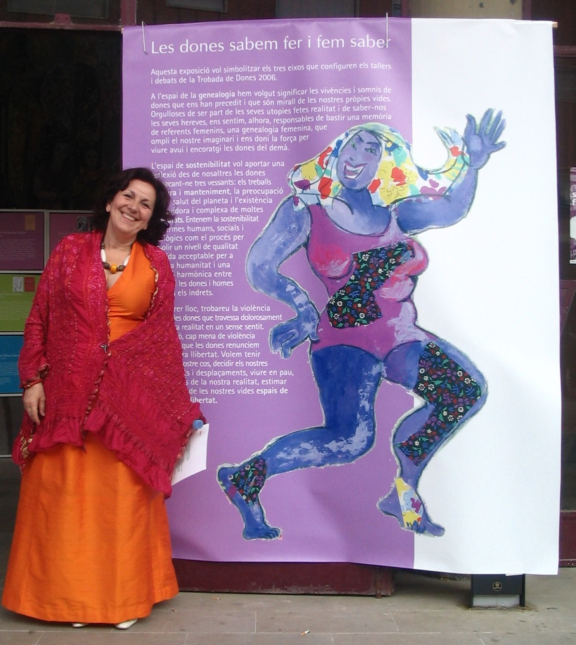 Роса Сарагоса